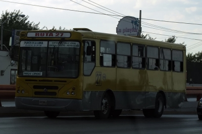 Ruta 27 de Transregio